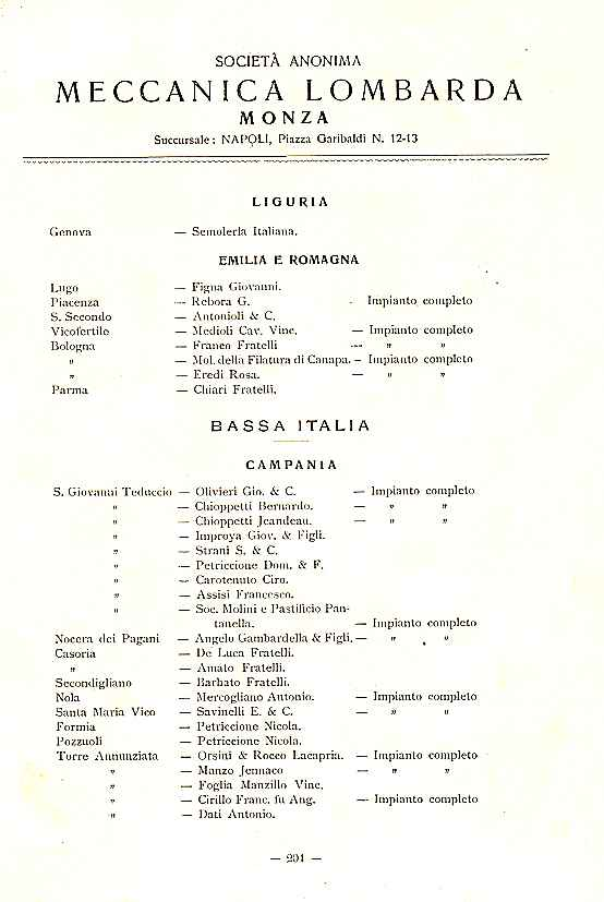 Società Anonima Meccanica Lombarda - Elenco dei molini eseguiti in Italia e all'estero pag. 204